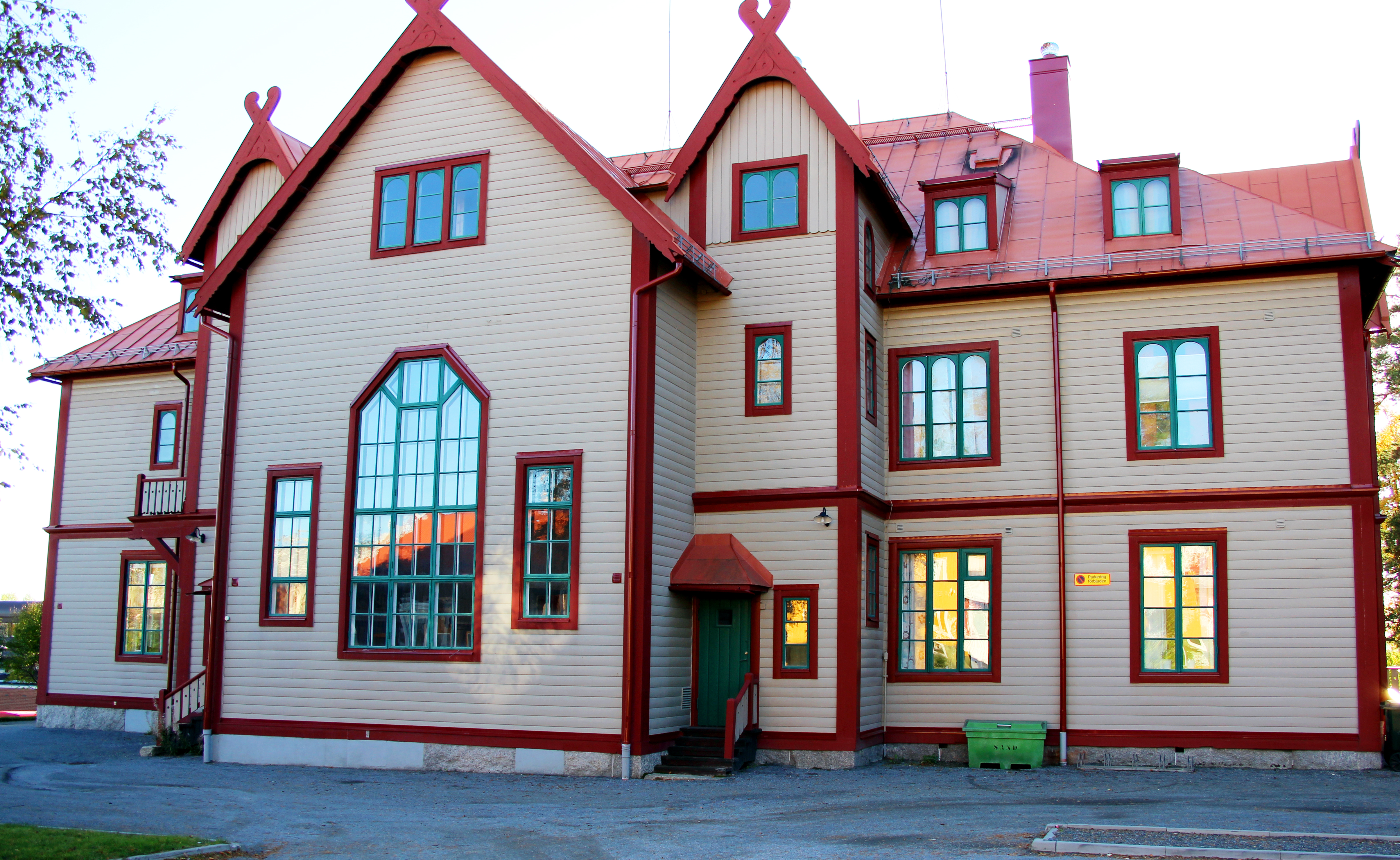 Tingshuset, Vilhelmina. Byggnadsår 1920. Albert Eriksson (Byggmästare) Nils Nordén (Arkitekt) Vilhelmina tingslags tingshusbyggnadsskyldige (Byggherre)